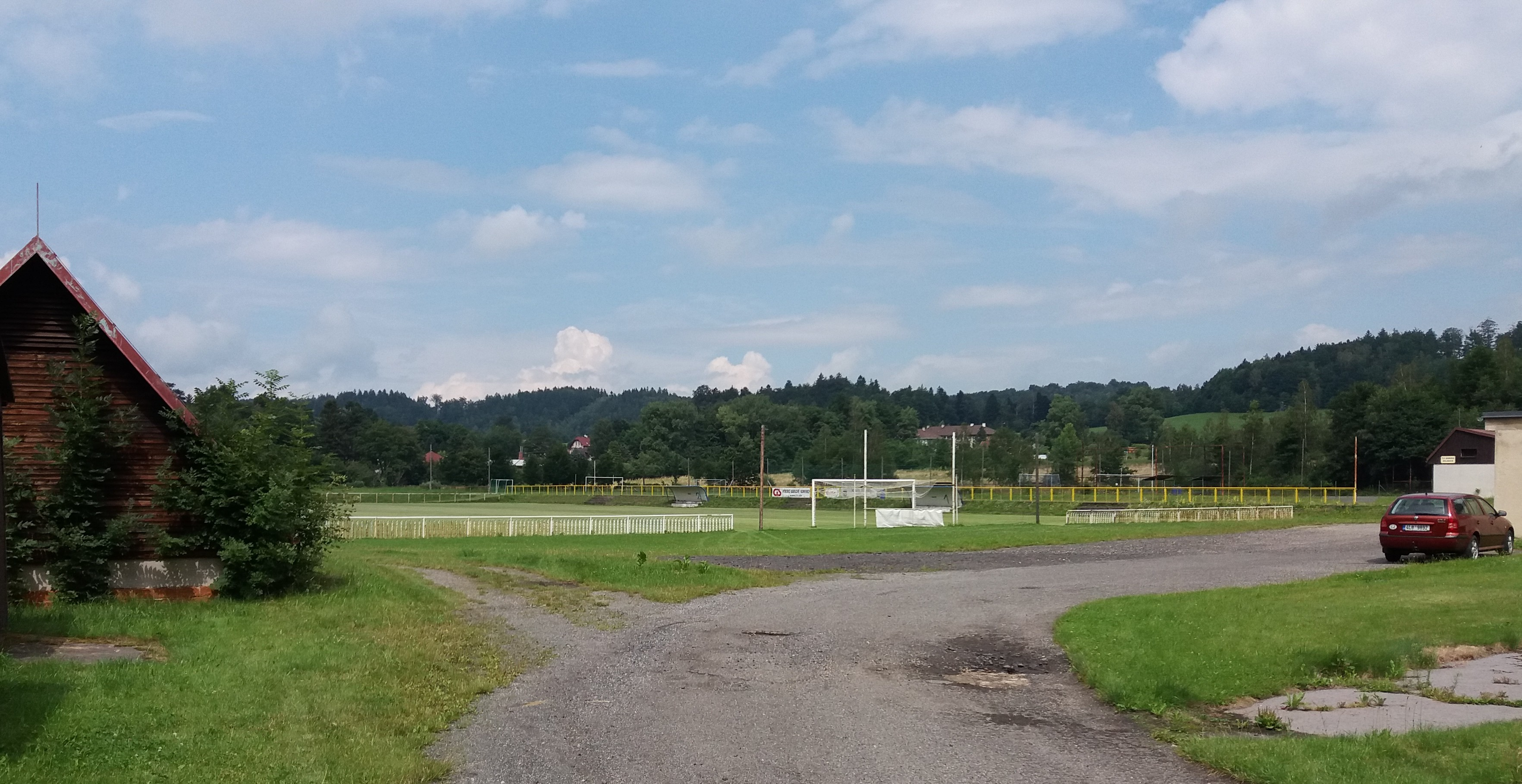 Fotbalové hřiště v Hejnicích.